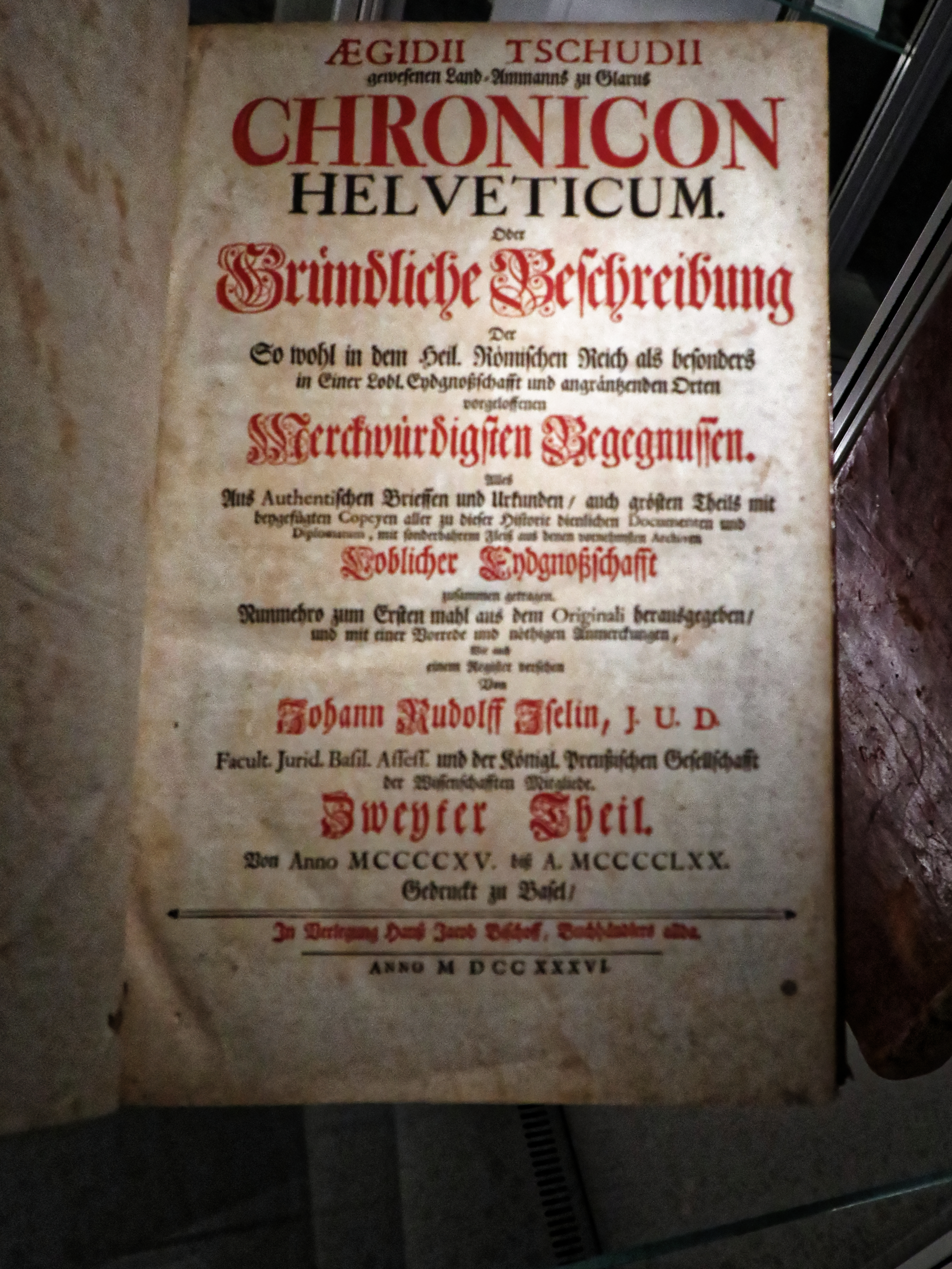 Bilder von Stadt und Landesmuseum Zürich